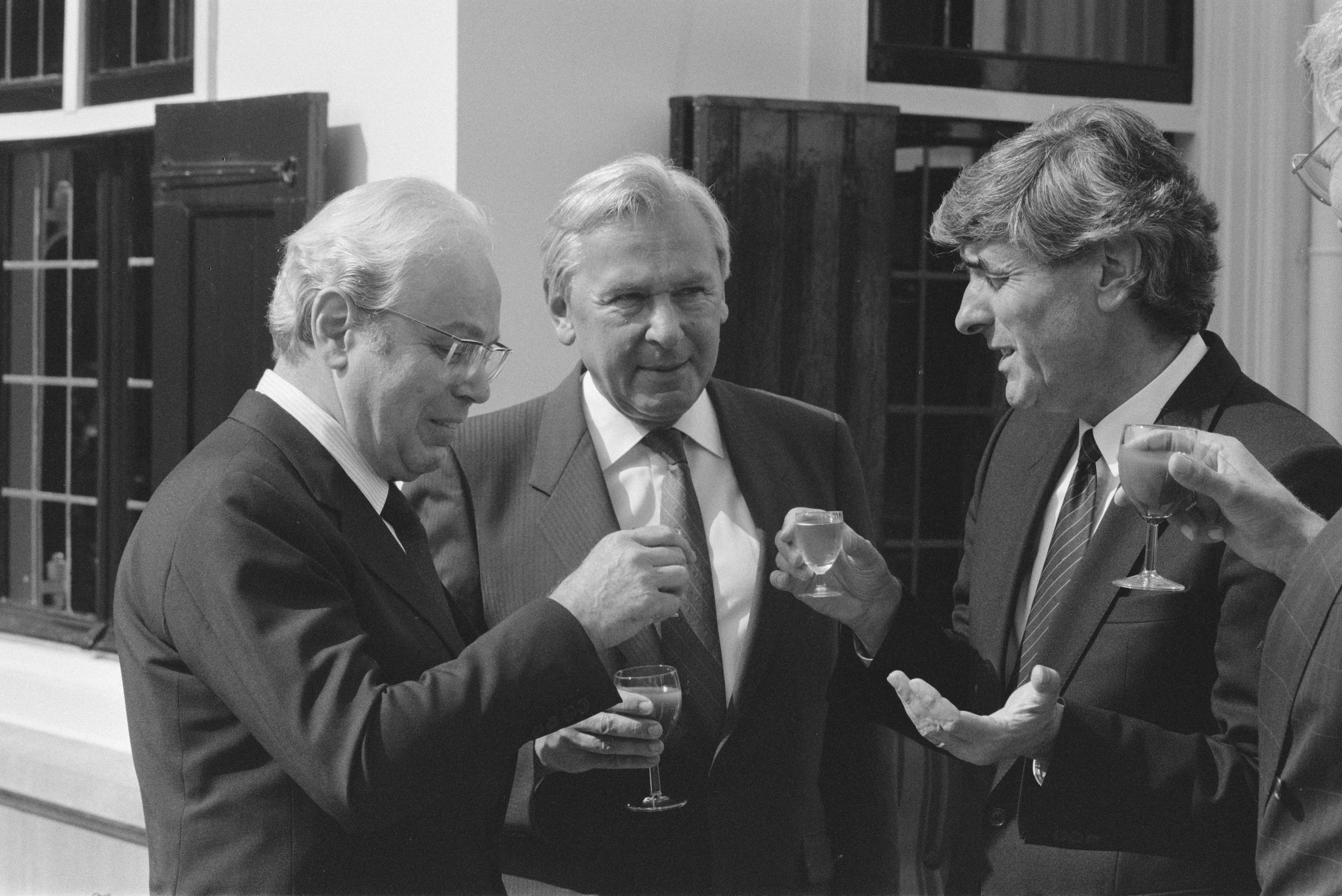 Collectie / Archief : Fotocollectie Anefo Reportage / Serie : [ onbekend ] Beschrijving : Premier Lubbers (r) ontvangt op Catshuis VN-secr.-gen. Perez de Cuellar (l) en onder secr.-gen. Fleischhauwer (m) Datum : 6 september 1988 Trefwoorden : premiers, secretarissen-generaal Persoonsnaam : Lubbers, Ruud, Pérez de Cuellar, Javier Fotograaf : Bogaerts, Rob / Anefo Auteursrechthebbende : Nationaal Archief Materiaalsoort : Negatief (zwart/wit) Nummer archiefinventaris : bekijk toegang 2.24.01.05 Bestanddeelnummer : 934-3071